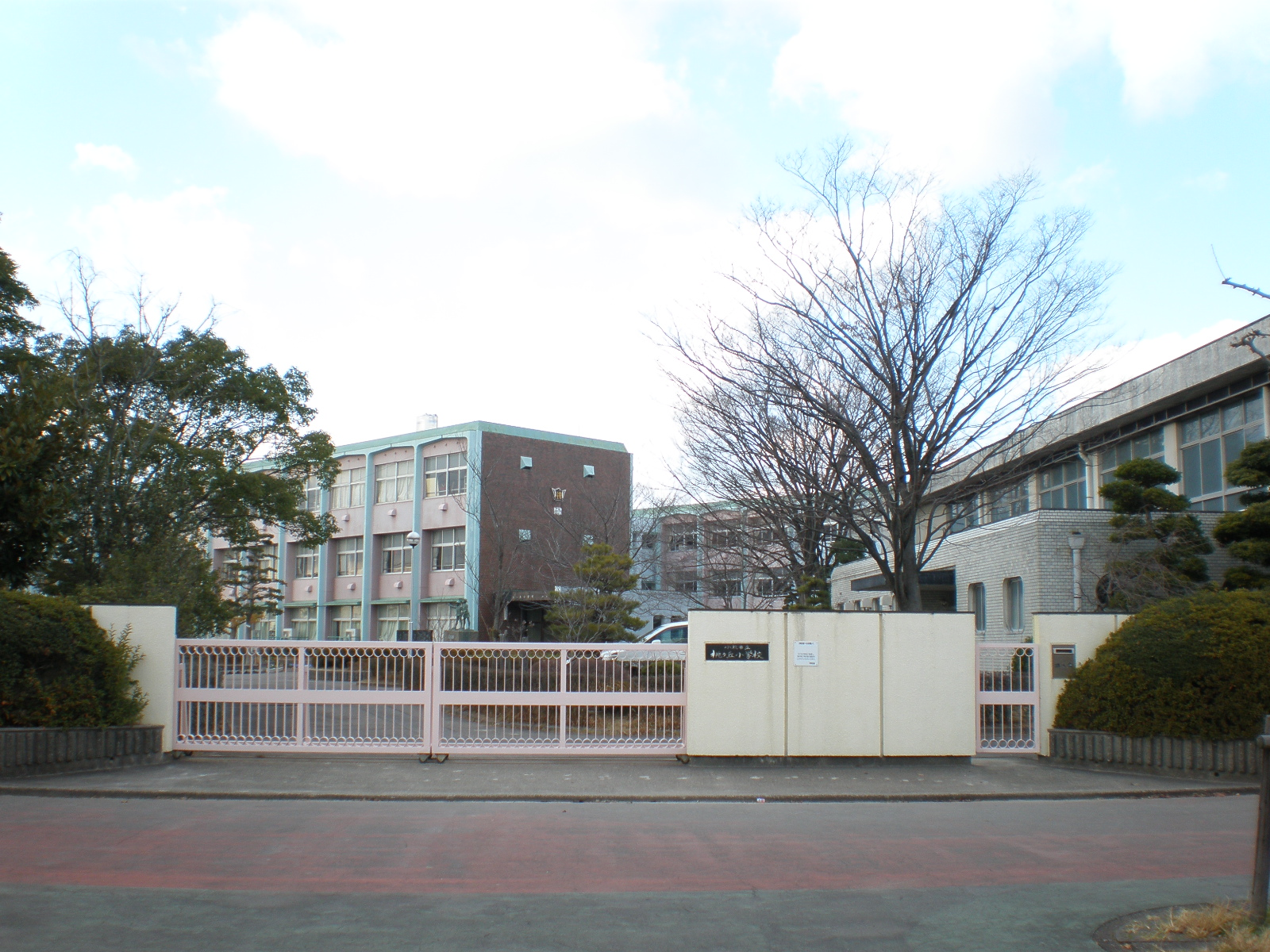 愛知県小牧市にある桃ヶ丘小学校